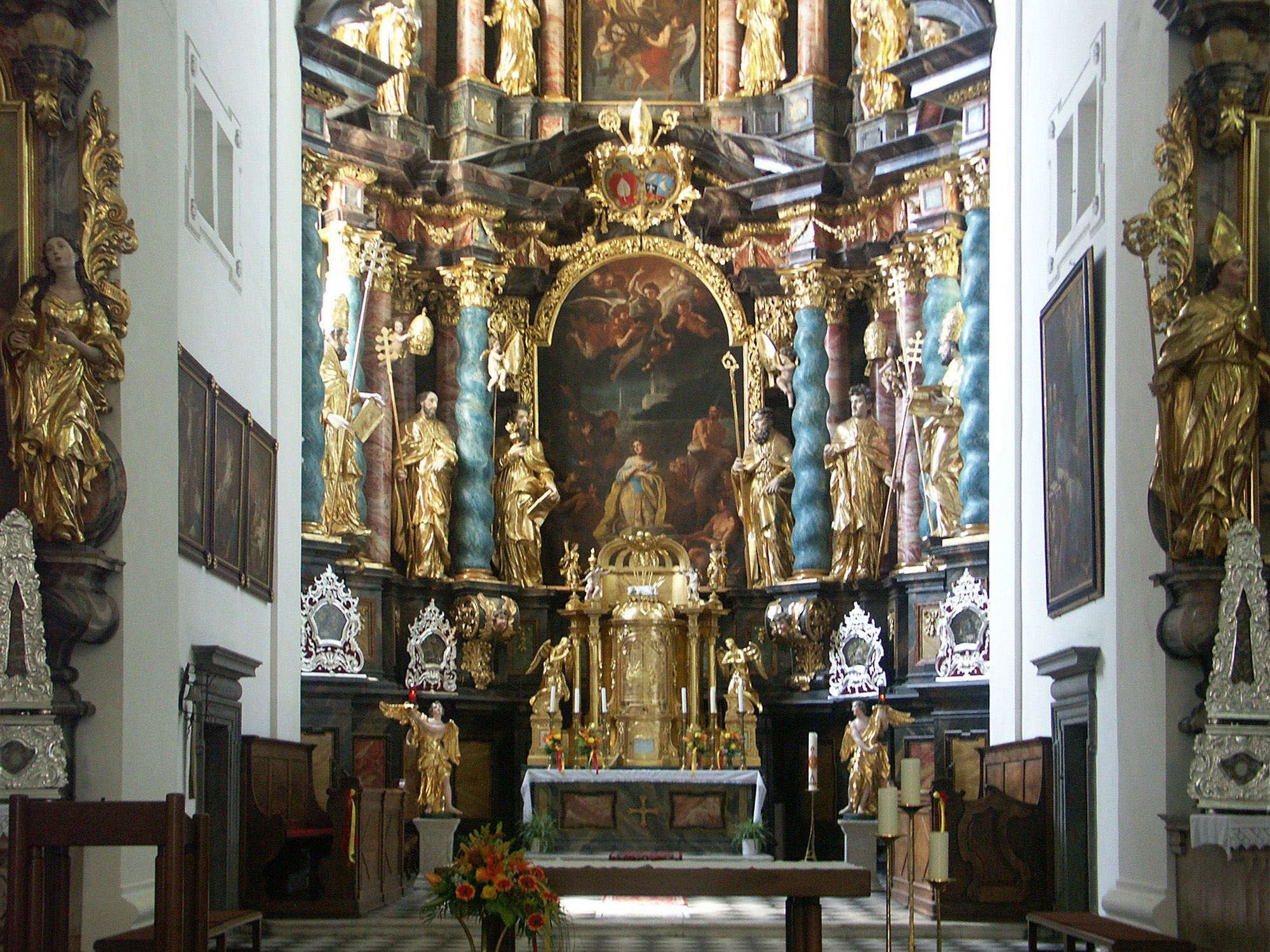 Der Hochaltar in der Pfarrkirche Stainz